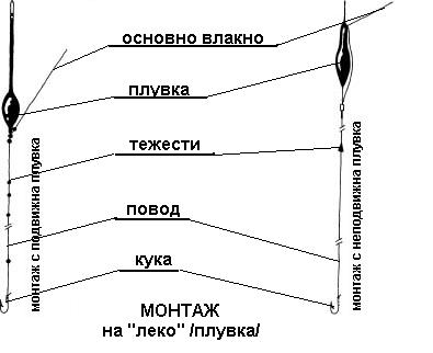 Риболов на леко